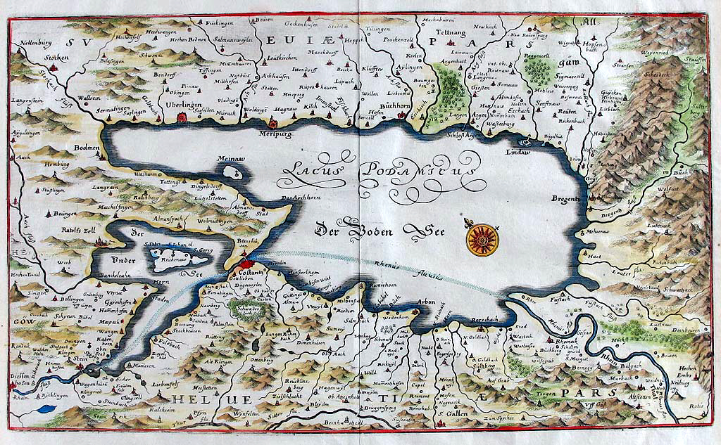 Lacus Podamicus. Der Boden See. Kolorierter Kupferstich, um 1640. Plattengröße 23 x 38 cm.